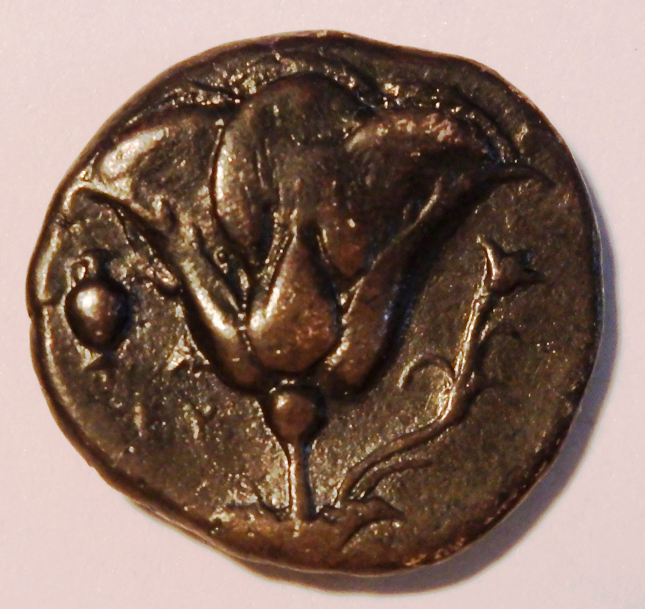 Stater aus Rhodos, Rose, Rückseite von Helioskopf, vgl. Szaivert/Sear Nr. 5049